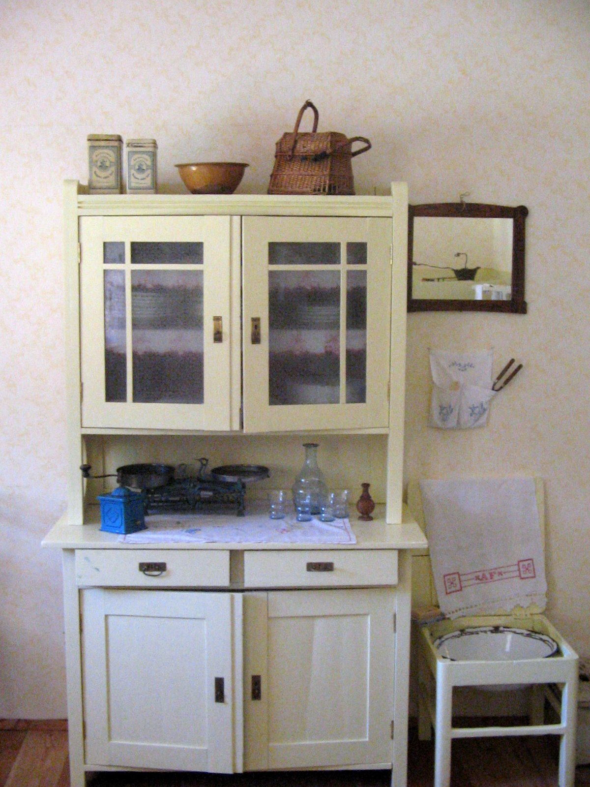 Delavsko stanovanje, Jesenice